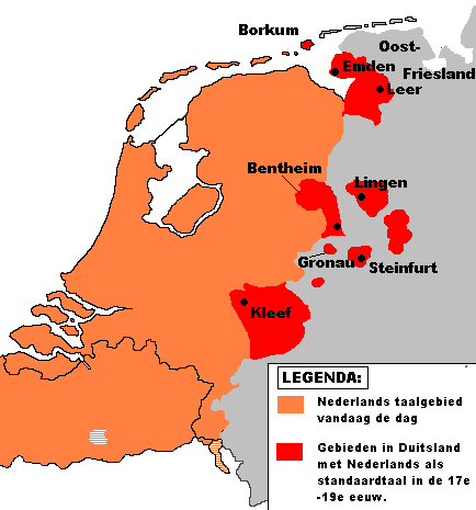 Vroegere Nederlandstalige gebieden in Duitsland (17e - 19e eeuw), exclusief het Limburgs/Nederrijns in het Noordelijke Rijnland (de regio Heinsberg-Düsseldorf). Zie ook Geldern. Vroegere Nederlandstalige gebieden in Duitsland (17e - 19e eeuw).